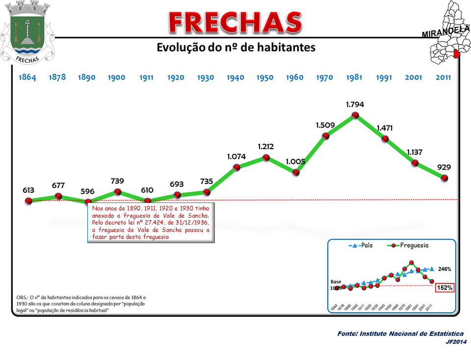 A População em 2011